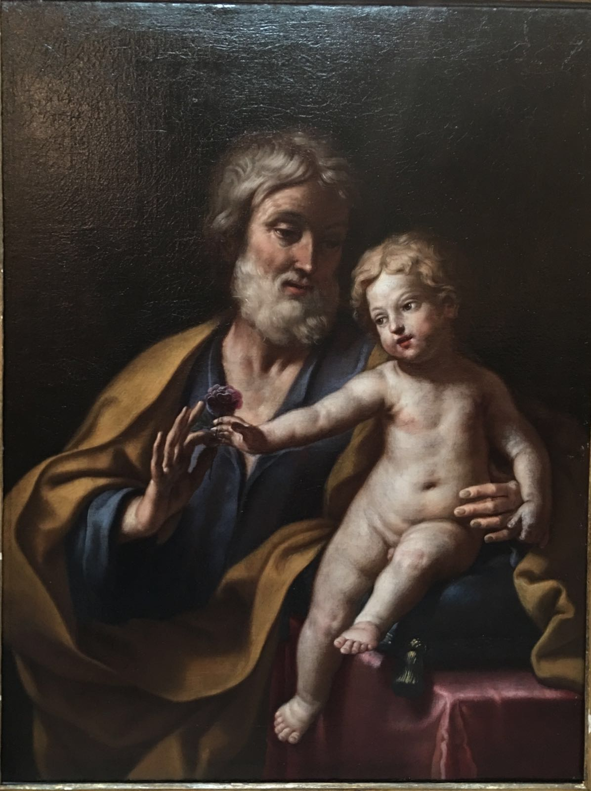 San Giuseppe e Gesù bambino,1662. olio su tela cm 95 x 75. Collezione privata